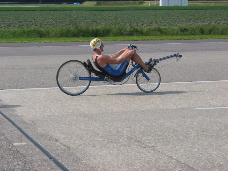 Thijs Roeifiets, afkomstig van toestemming verkregen om foto's voor Wikipedia te gebruiken van maker Wilbert Berendsen.